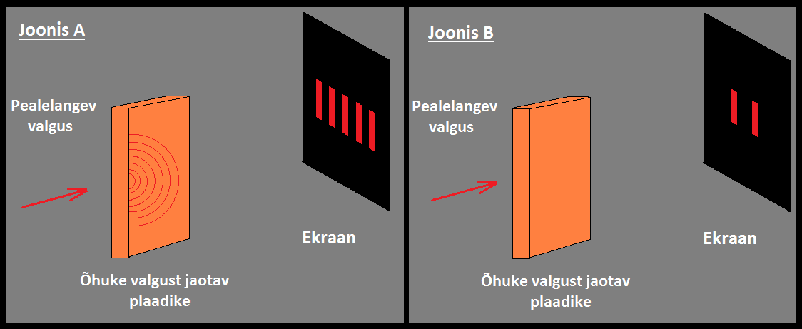 Joonistel on kujutatud valguse käitumine, kui sellel oleks vaid osakese omadused (Joonis B) ning valguse tegelik käitumine (Joonis A), mis viitab valguse laineomadustele (interferentsipildi tekkimine).